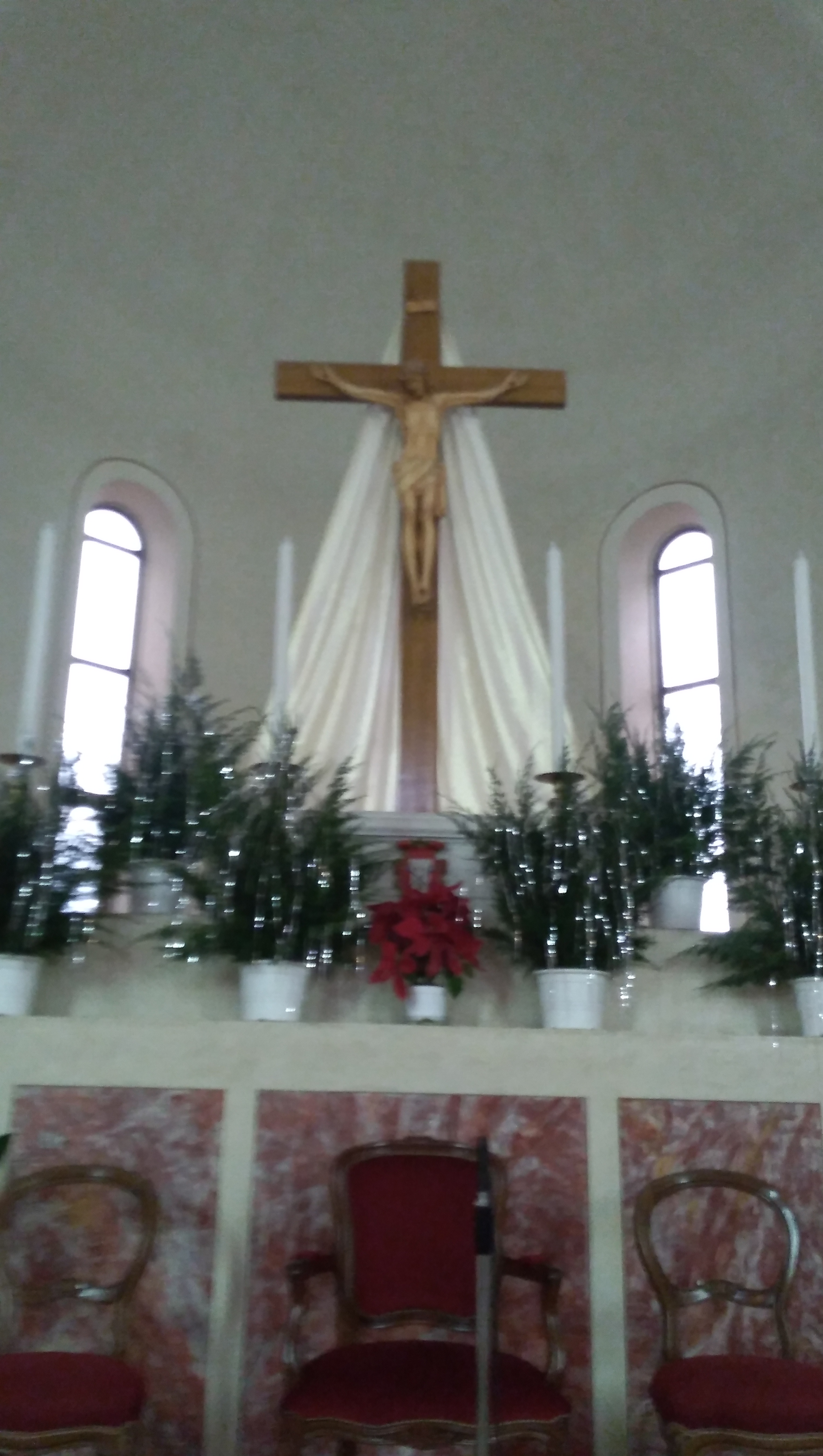 Da notare è il basamento descritto in precedenza